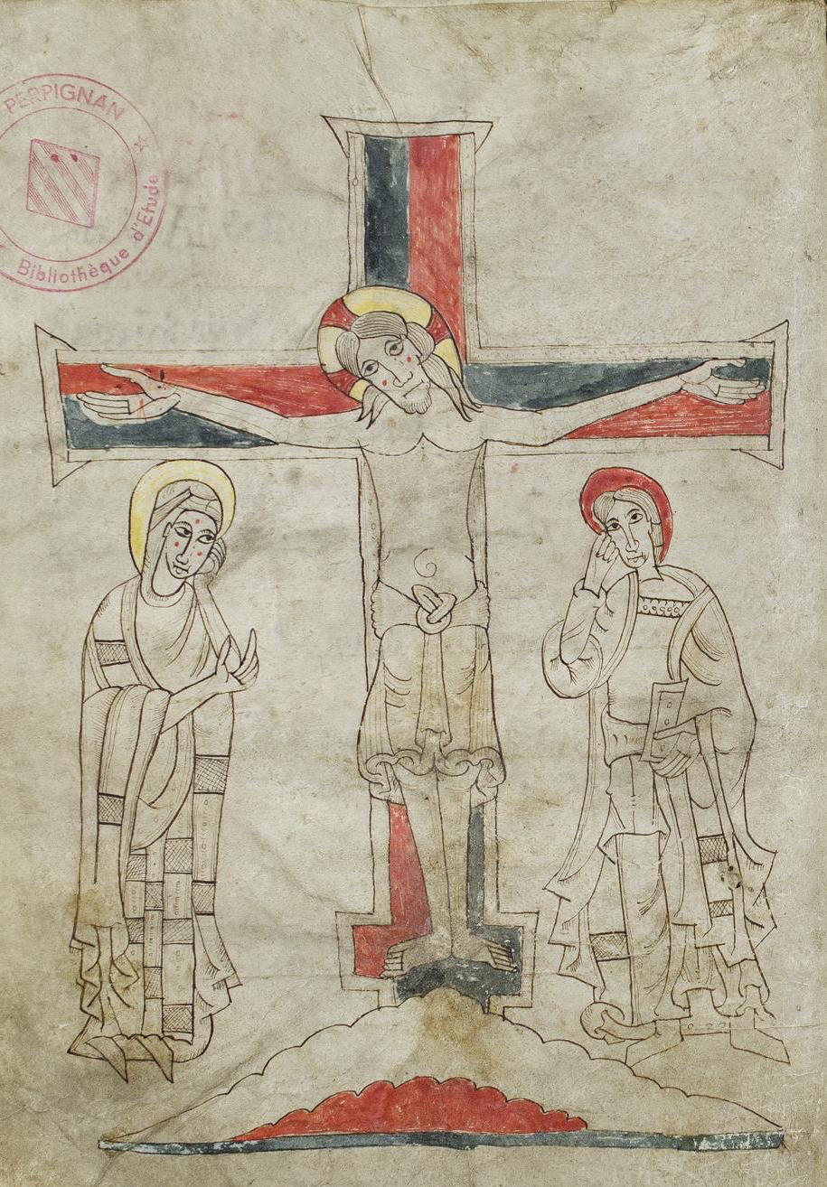 Folio 18 du Missel d'Arles-sur-Tech, représentant un Christ en croix, la vierge Marie et Saint-Jean l'Évangéliste (XIIe s.)